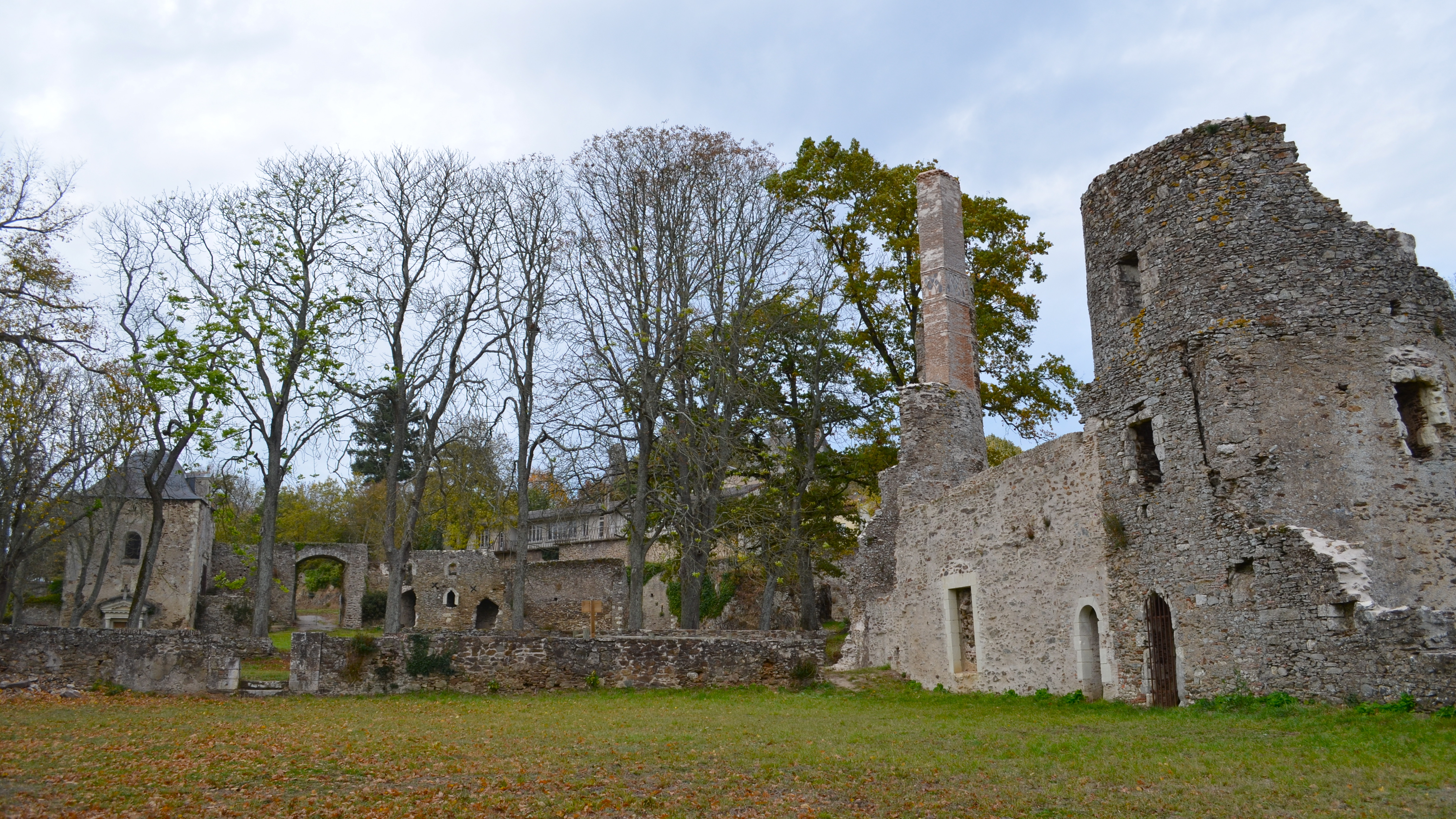 Vieux château de la Turmelière - Liré (Maine-et-Loire)